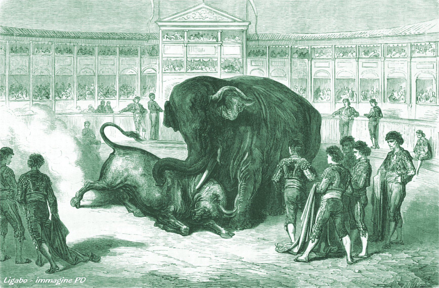 Combattimento tra elefante e toro nell'arena di Madrid. 1865